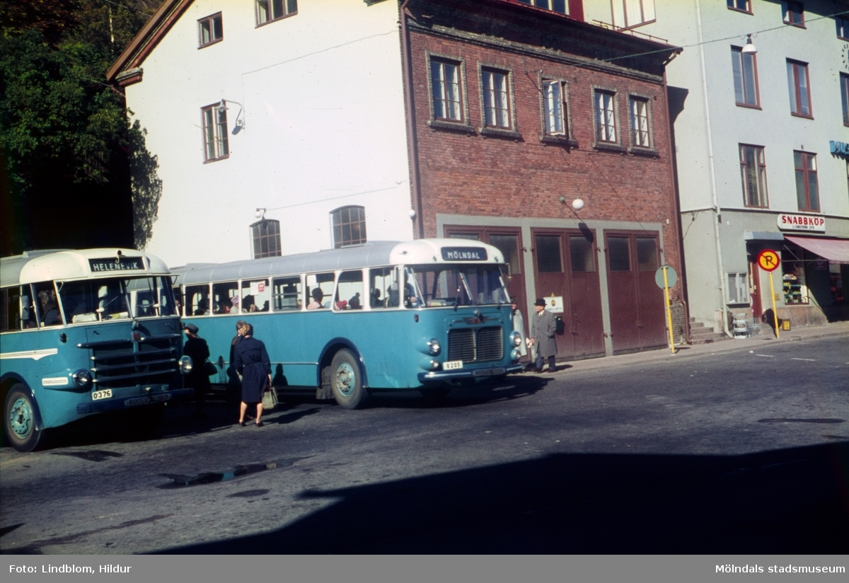 Två blå bussar står på en busshållplats vid Gamla Torget i Mölndal, 1970-tal. I mitten ses huset Kvarnbygatan 41, tidigare brandstation och garage för polisbilar, numera Mölndals målarskola. Till höger ses del av huset Kvarnbygatan 43, tidigare Mölndals stadshus, sedermera musikskola.